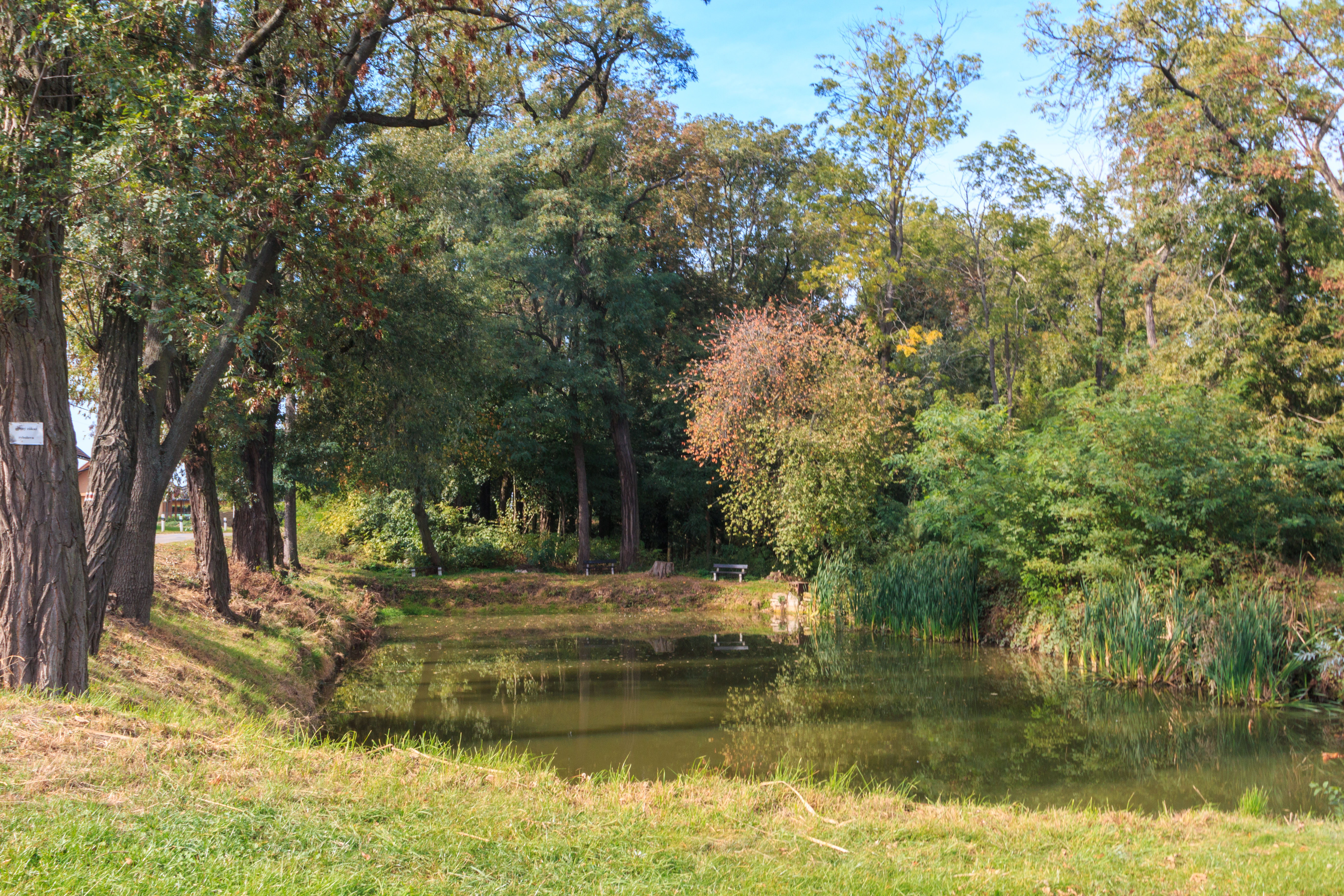 Rybníčky ve vesnici Polizy Project: Vodstvo.